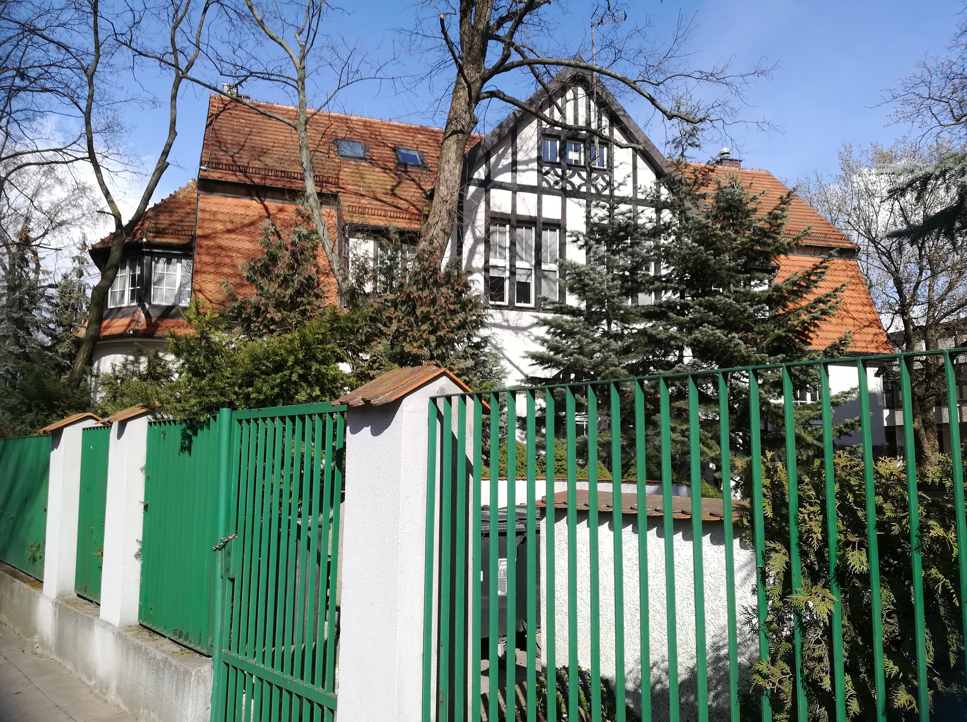 Budynek infekcyjny dawnego szpitala Rohrów, przebudowany po wojnie na dom mieszkalny przy ul. Zygmunta Noskowskiego 12, Poznań.